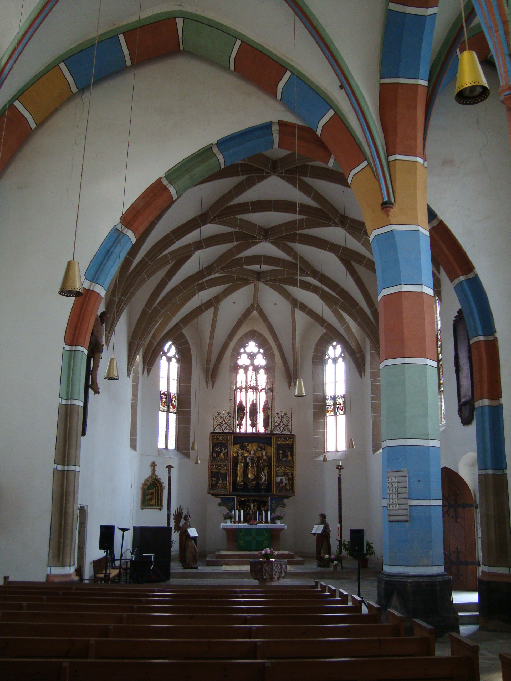 Innenansicht der Stiftskirche Ebersdorf